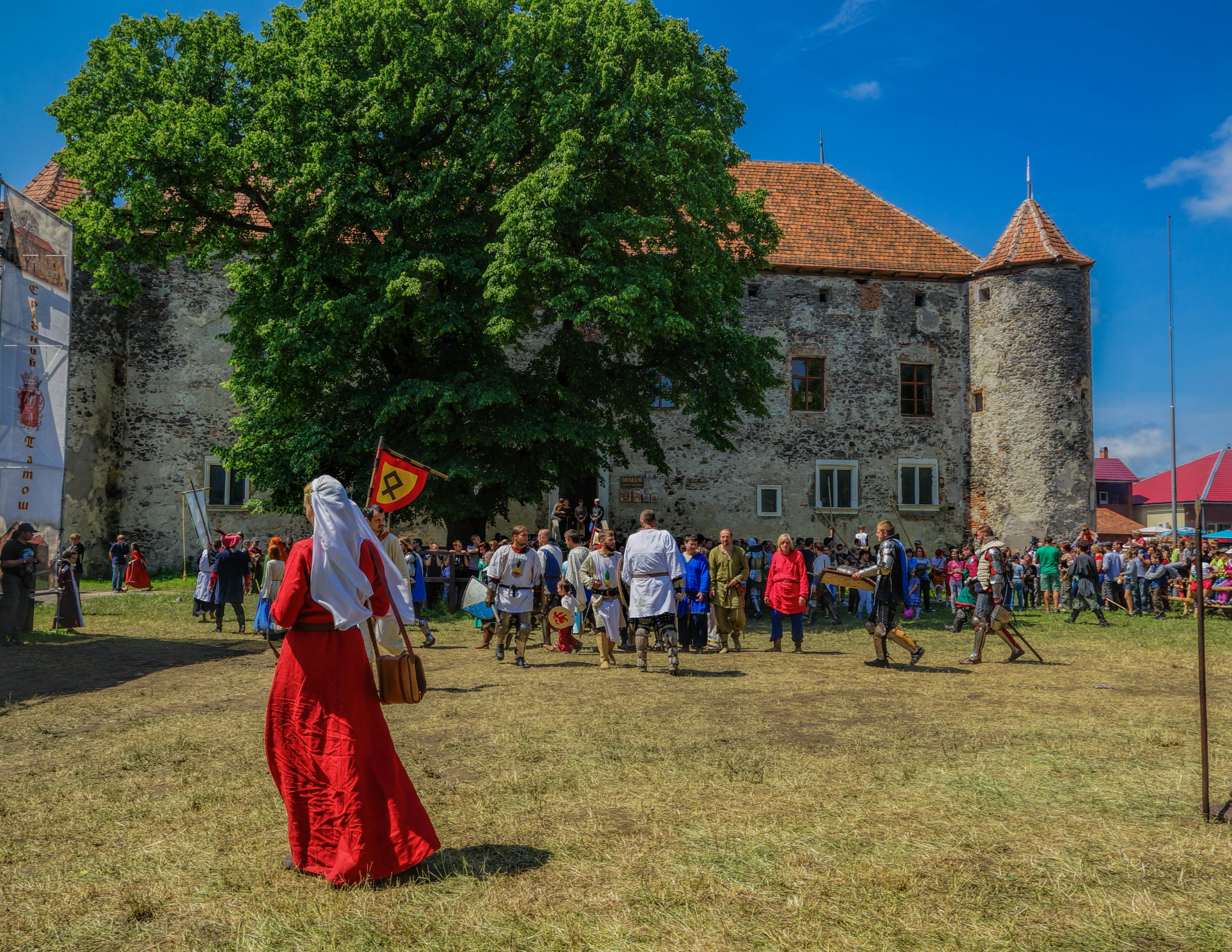 Замок у Чинадійово (мур.), смт. Чинадійово, вул.Волошина,54